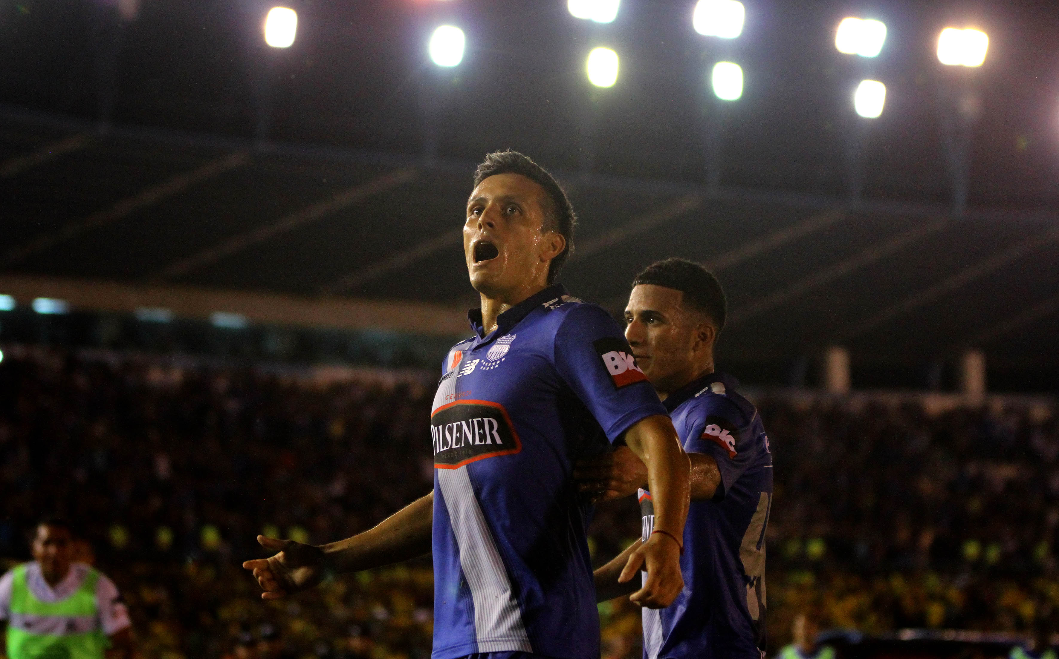 Guayaquil, domingo 08 de marzo del 2015 (ANDES).-En el estadio Alberto Spencer Emelec derrota 2X0 a Barcelona en la octava fecha del campeonato nacional de fútbol Foto:César Muñoz/ANDES